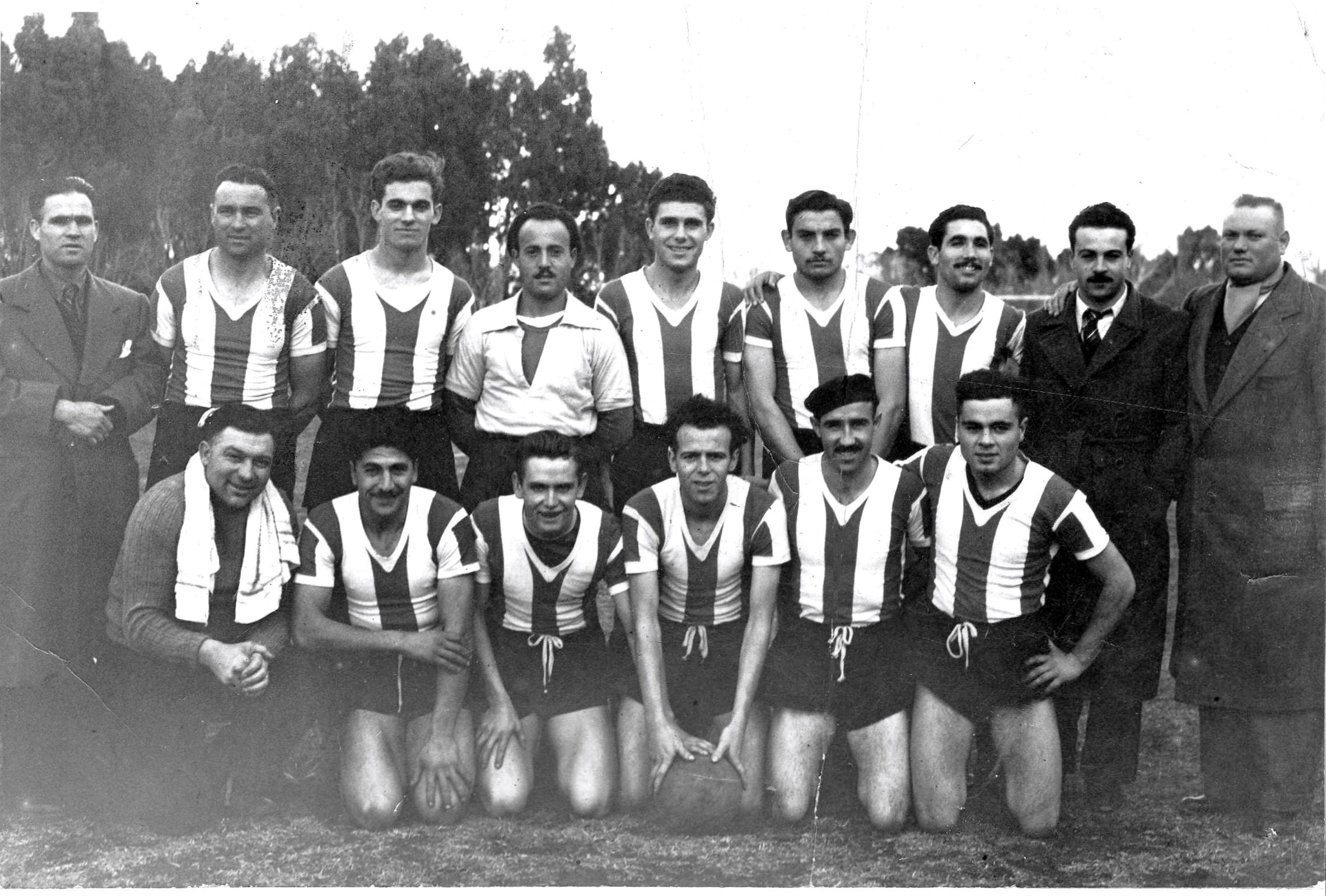 Equipo del Club Atlético Sansinena campeón de segunda división de la Liga del Sur en 1953